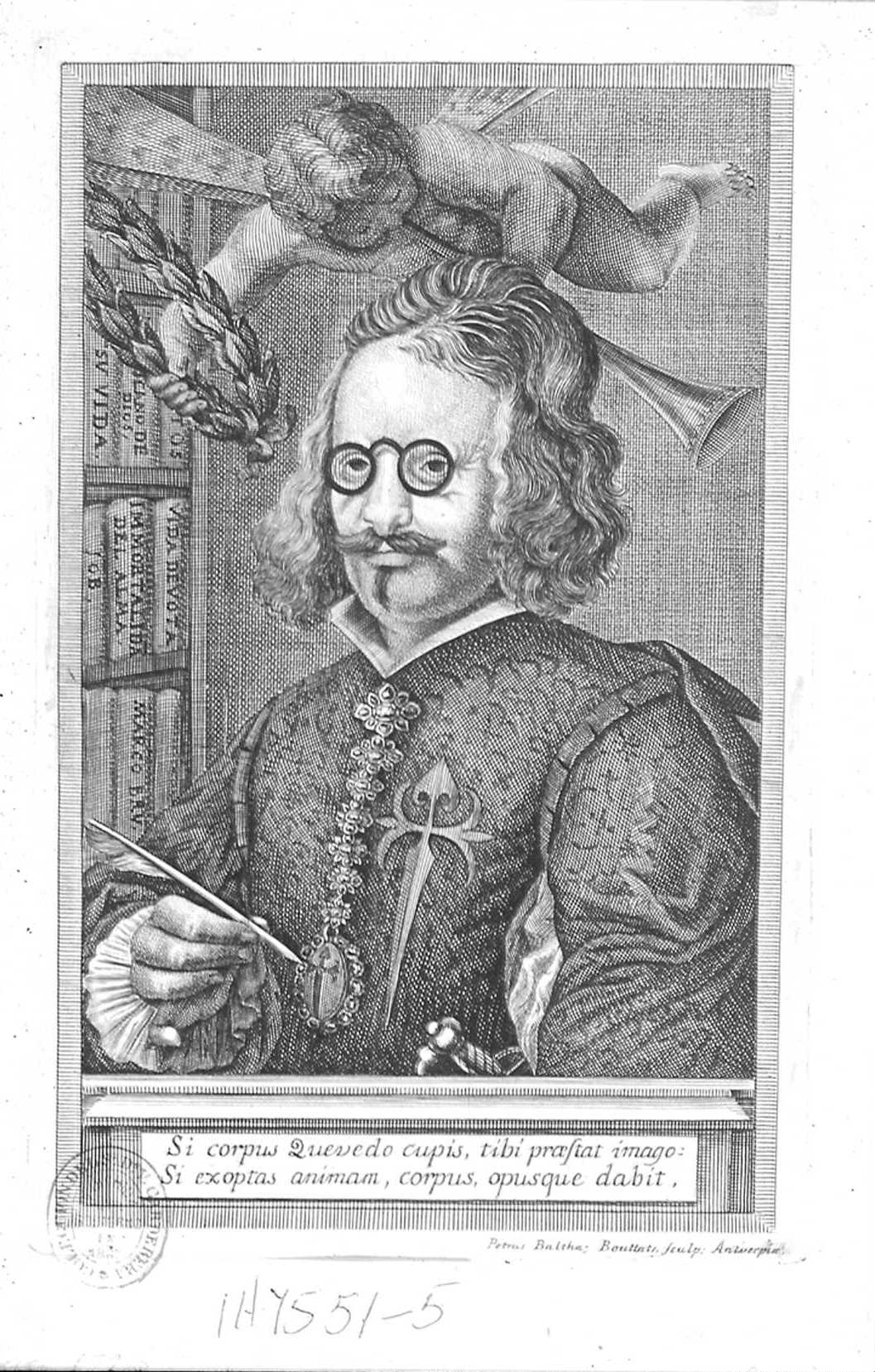 Retrato de Francisco de Quevedo (1580-1645), Amberes, casa de Juan Bautista Verdussen.